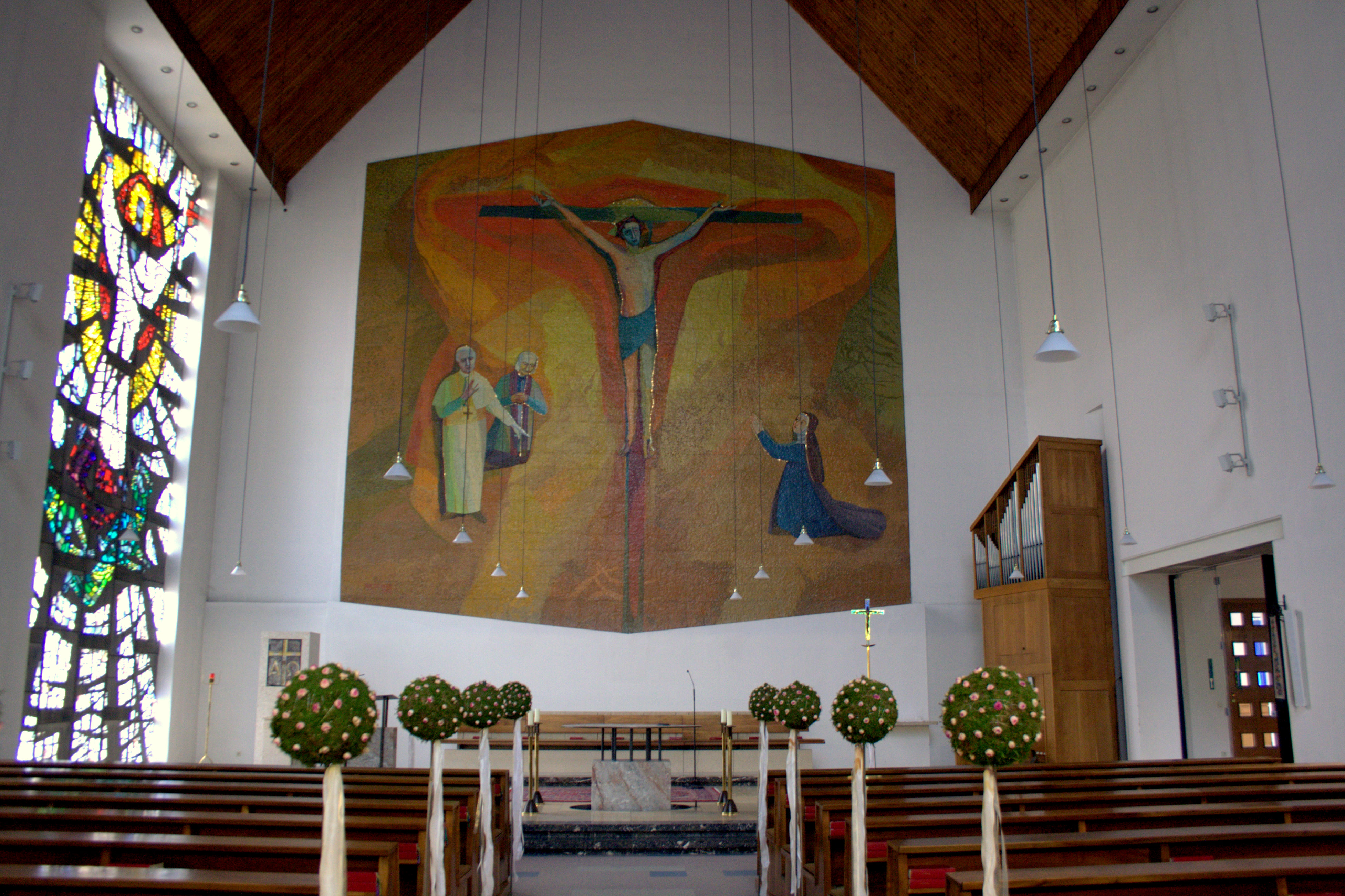 Gratz Wetzelsdorf Christkönigskirche Innenansicht. Hubert Tuttner: Christus am Kreuz, Papst Pius X., Hll. Rita und Johannes Vianney, 1962